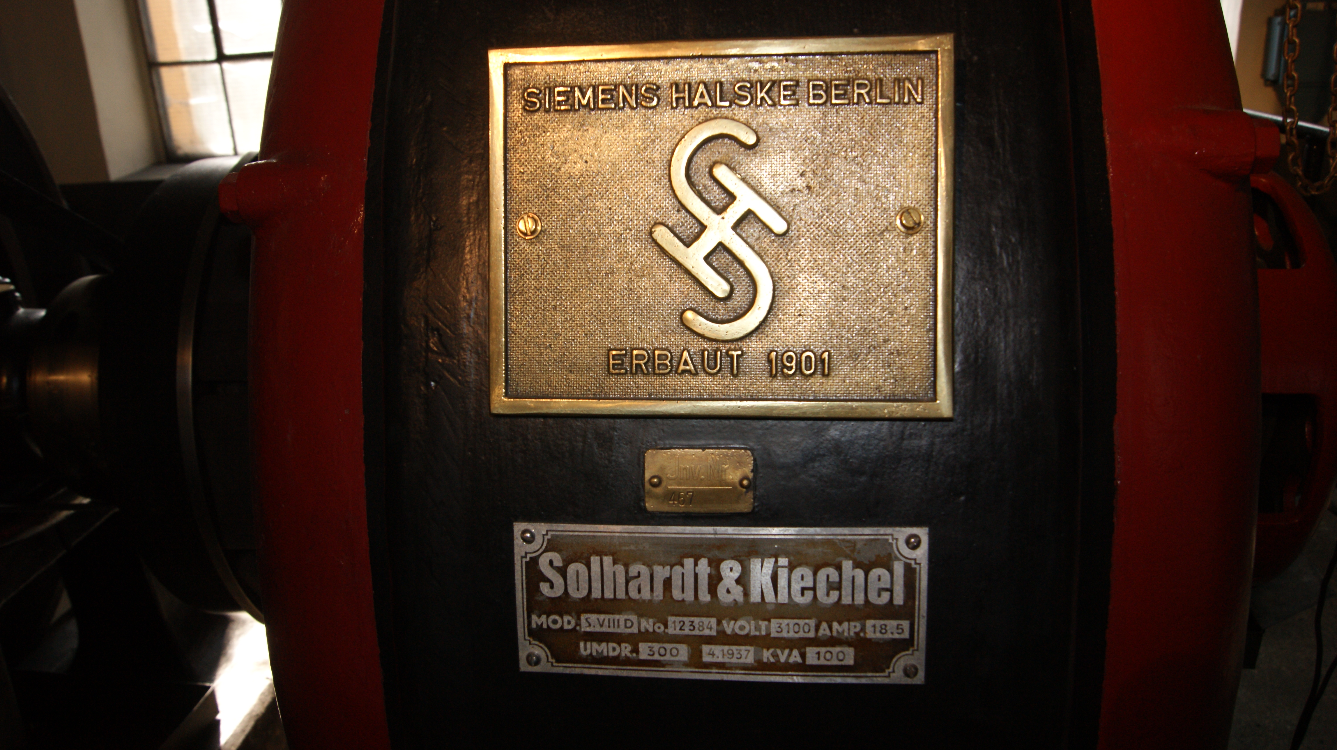 Kraftwerk Forach (Dornbirn, Vorarlberg, Österreich, Typenschild Generator Siemens & Halske.